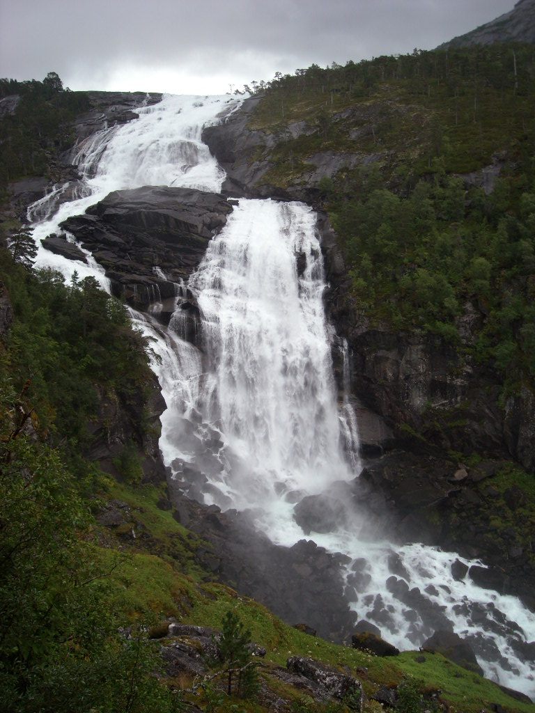 Une grande cascade à Kinsarvik